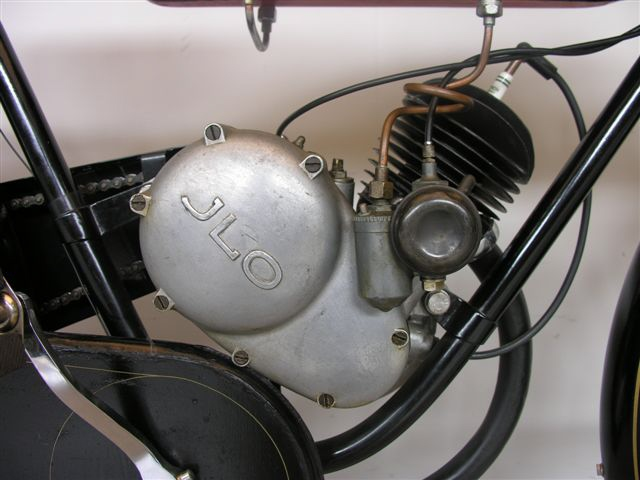 ILO 98 cc twataktmotor út 1934.